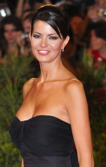 66ème Festival du Cinéma de Venise (Mostra), 2ème jour (03/09/2009) Tapis Rouge pour le film : The Road